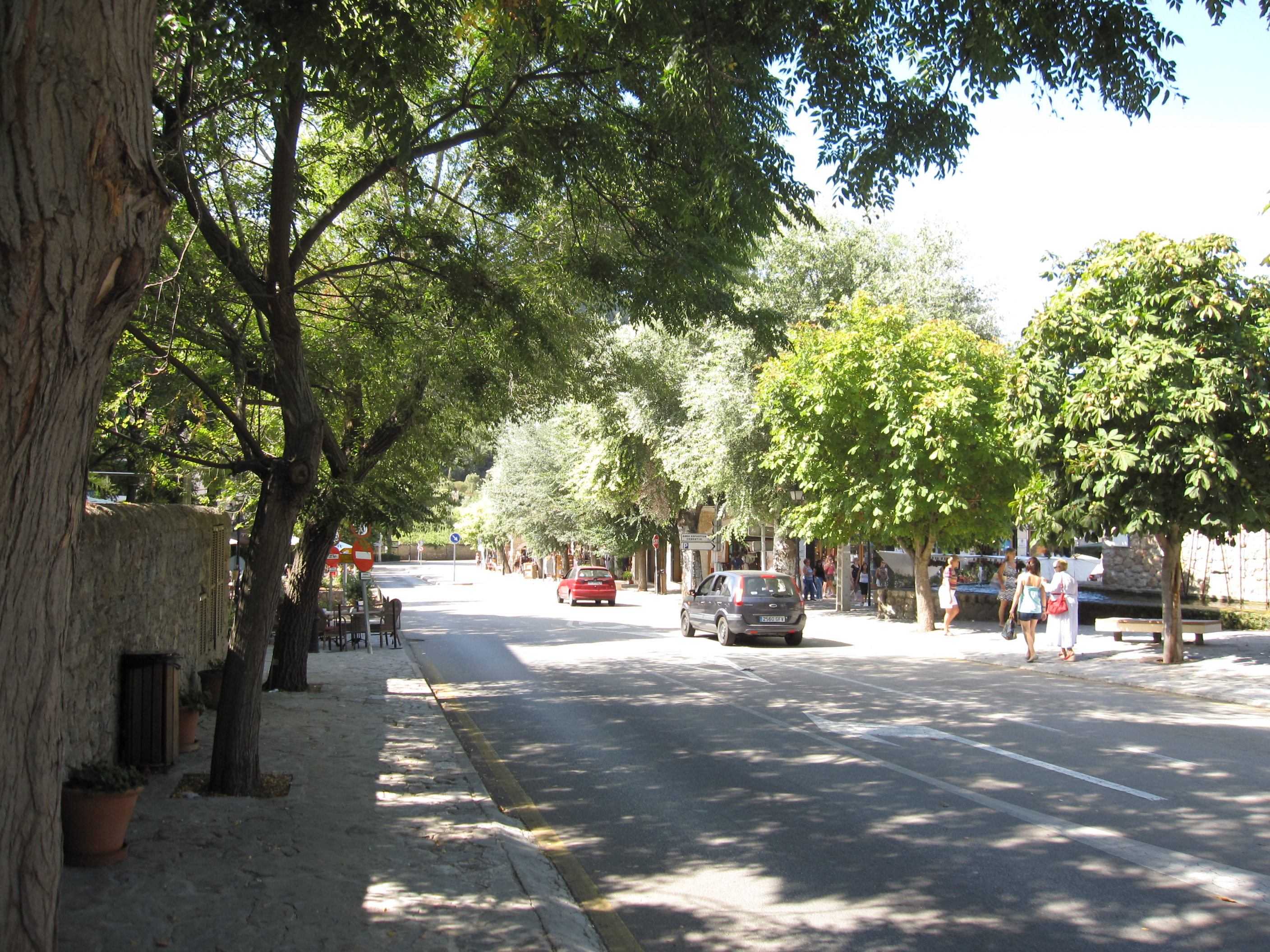 Valldemossa